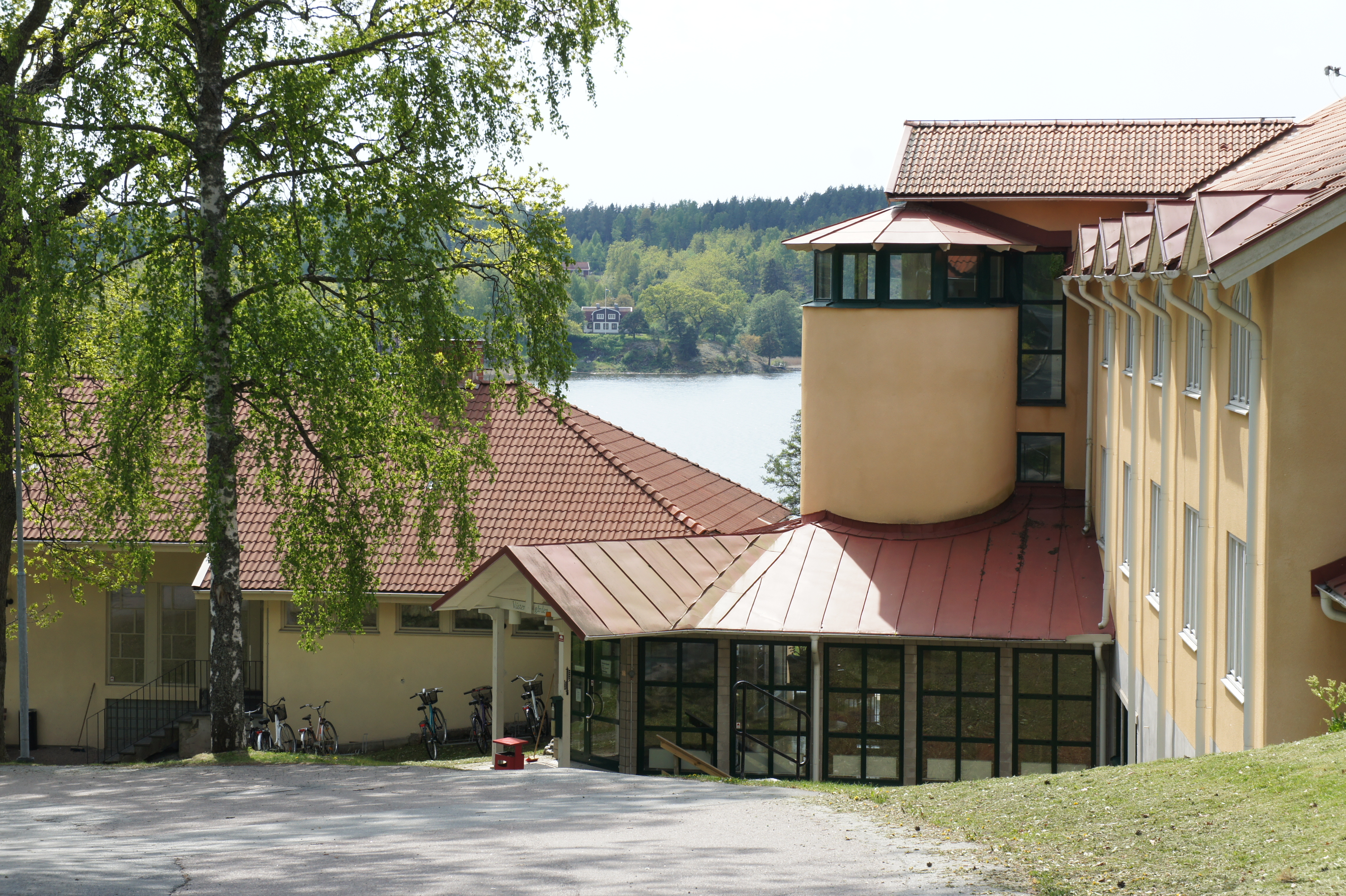 Västergården, vy mot mälaren.